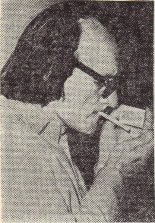 Scriitorul Ștefan Bănulescu